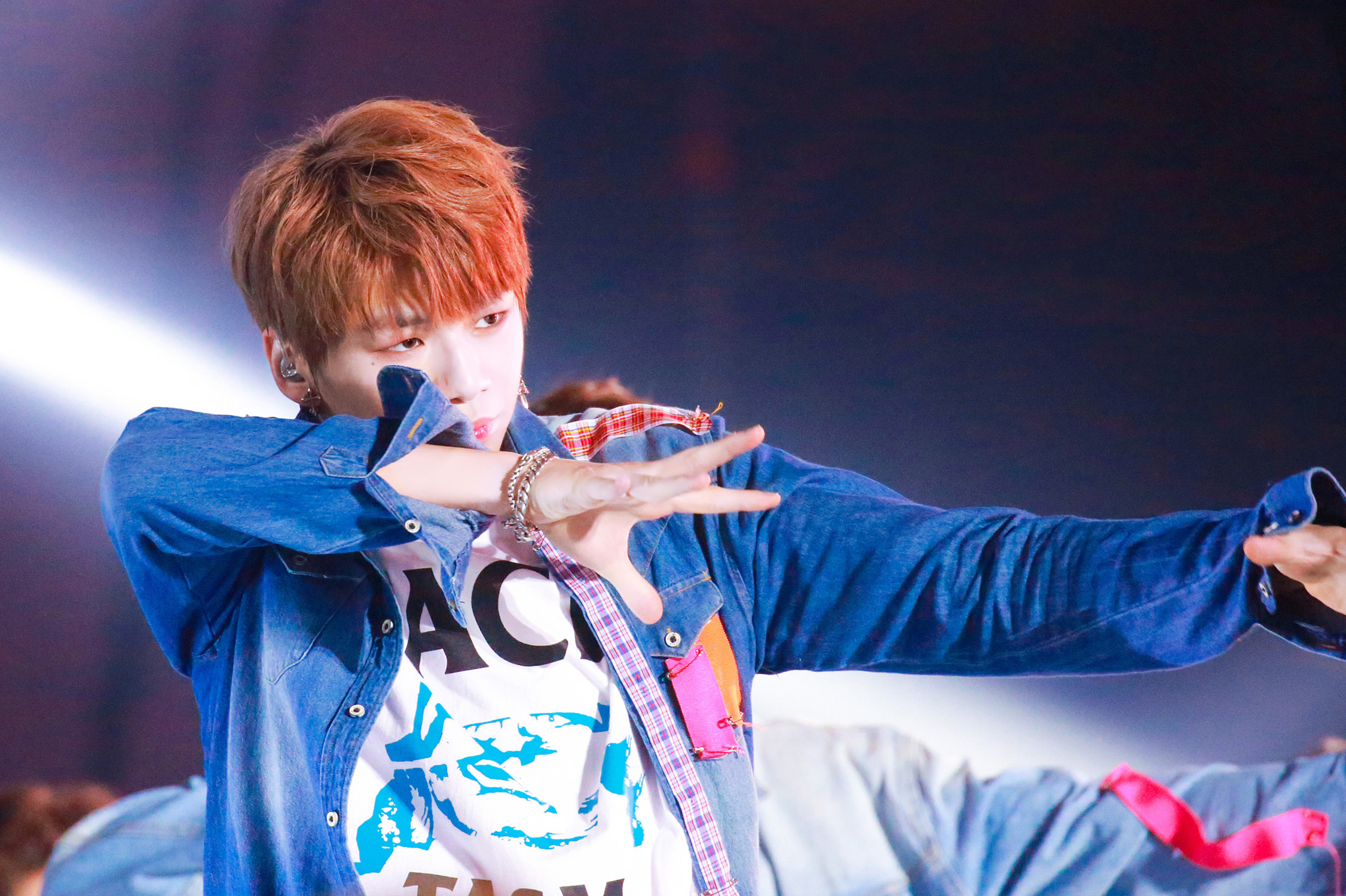 Kang Daniel during the Wanna One Premiere Show Concert on August 7, 2017.